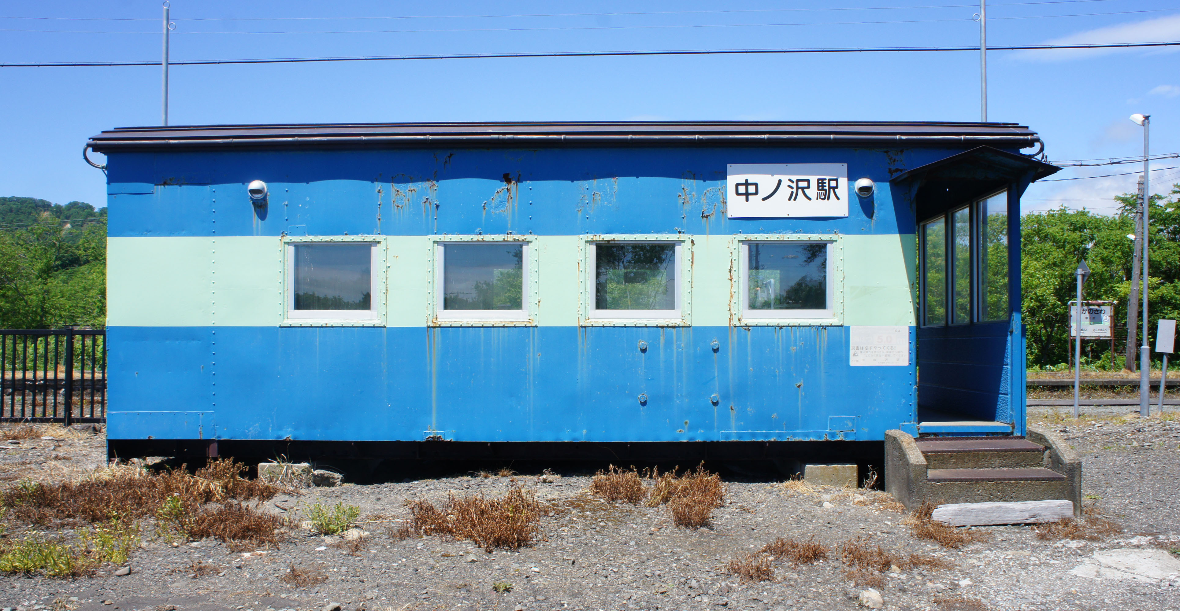 JR函館本線・中ノ沢駅の駅舎